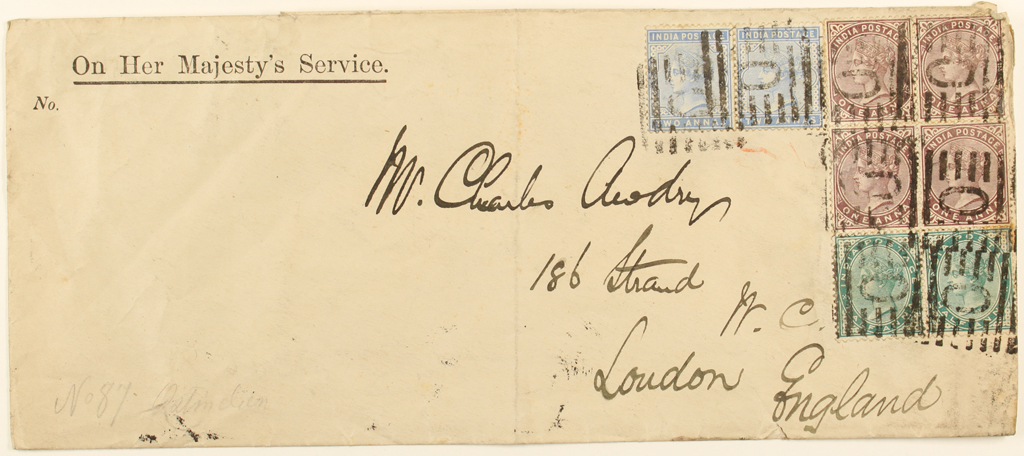 Briefmarken, lose in einer Schachtel aufbewahrt (pro Konvolut ein Umschlag). Die Postewertzeichen sind von unterschiedlichem Aussehen und Wert. Insgesamt 16 Marken, davon 22 Marken aus Indien, 20 Marken vom Kap der Guten Hoffnung in Südafrika 5 Marken aus Hong Kong, 4 Marken von Gibraltar und jeweils eine Marke von Malta, Zypern und den Fidjiinseln. Alle zeigen König Eduard VII. von England. Einige Marken sind noch mit einem ausgeschnittenen Stück eines Briefumschlages verbunden, acht der indischen Marken kleben auf einem komplett erhaltenen Umschlag. Die meisten sind einem Stempel versehen. Briefmarken: 2 × Two Anna in Blau 4 × One Anna in Lila 2 × Half Anna in Grün Poststempel: Jal Cooper Type 34, Square Cancellation, O - Lucknow (Oudh Circle) ([1]). Text: On Her Majesty's Service. No. Mr. Charles Awdry 186 Strand W.C. London England No 87 Ostindien